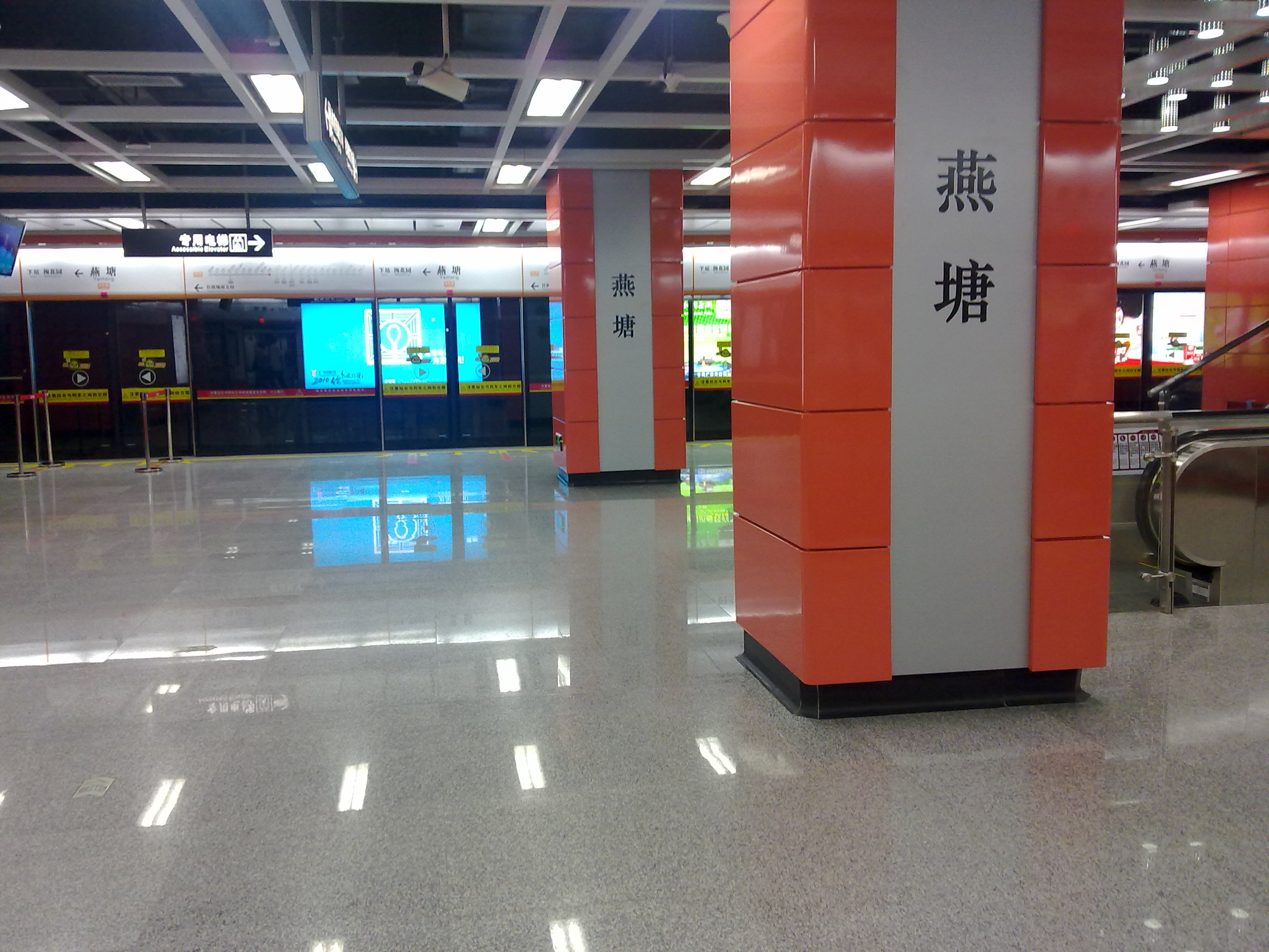 廣州地鐵燕塘站